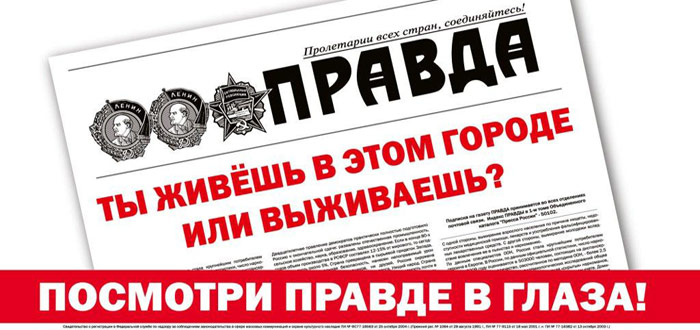 Агитационный плакат КПРФ.